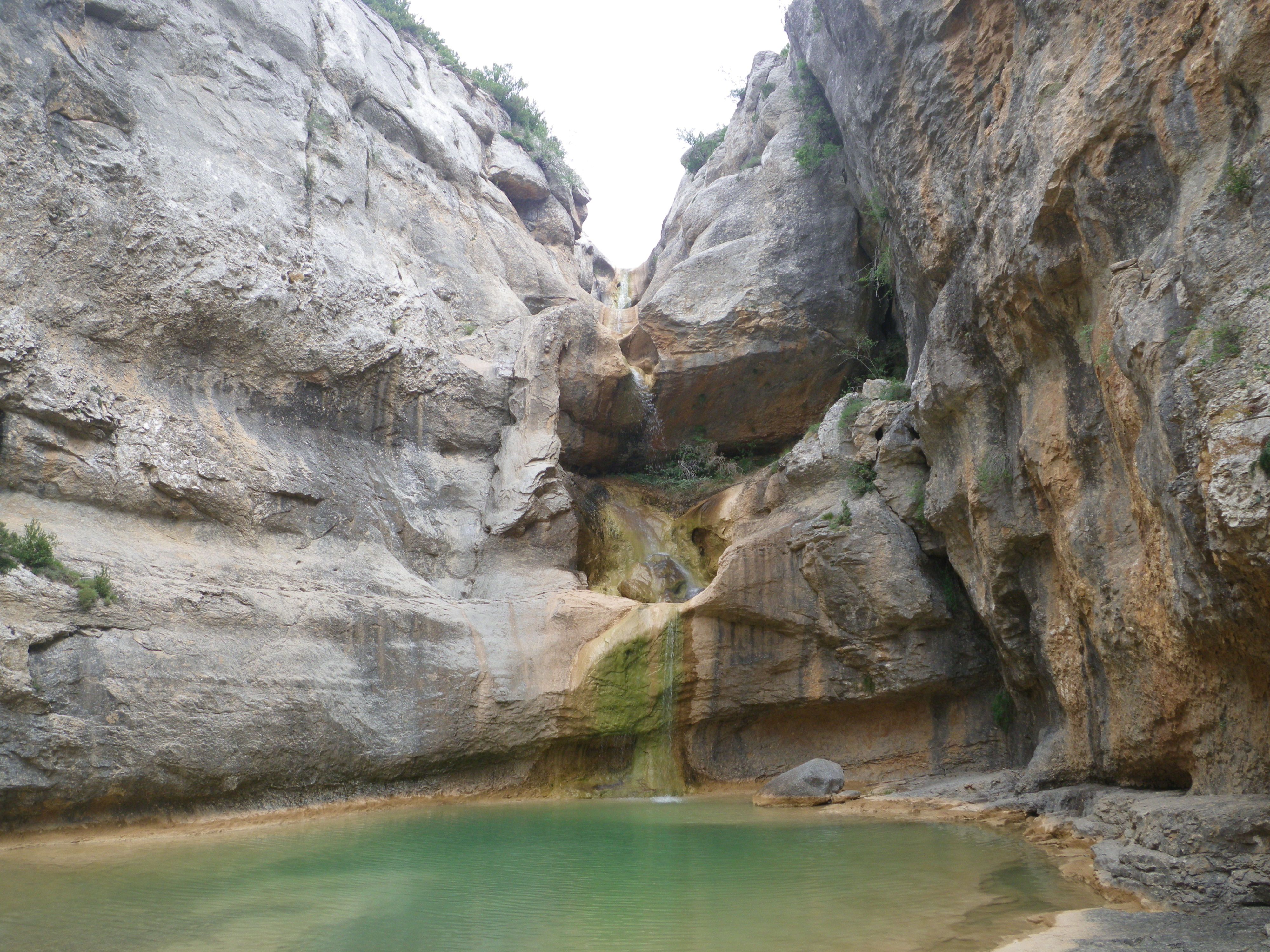 Dans le lit du Mascún, en direction du nord, la falaise Saltador de las Lañas, le faible débit d'eau en cette saison, et la piscine naturelle en bas de la cascade